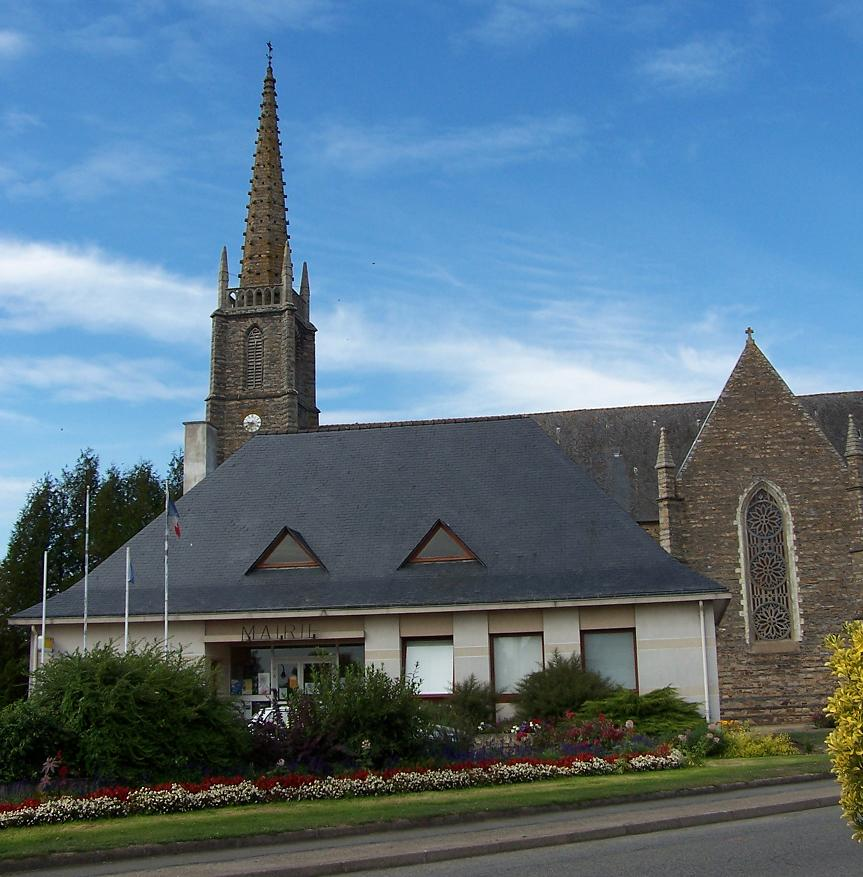 Mairie et église de Sainte-Marie, en Ille-et-Vilaine